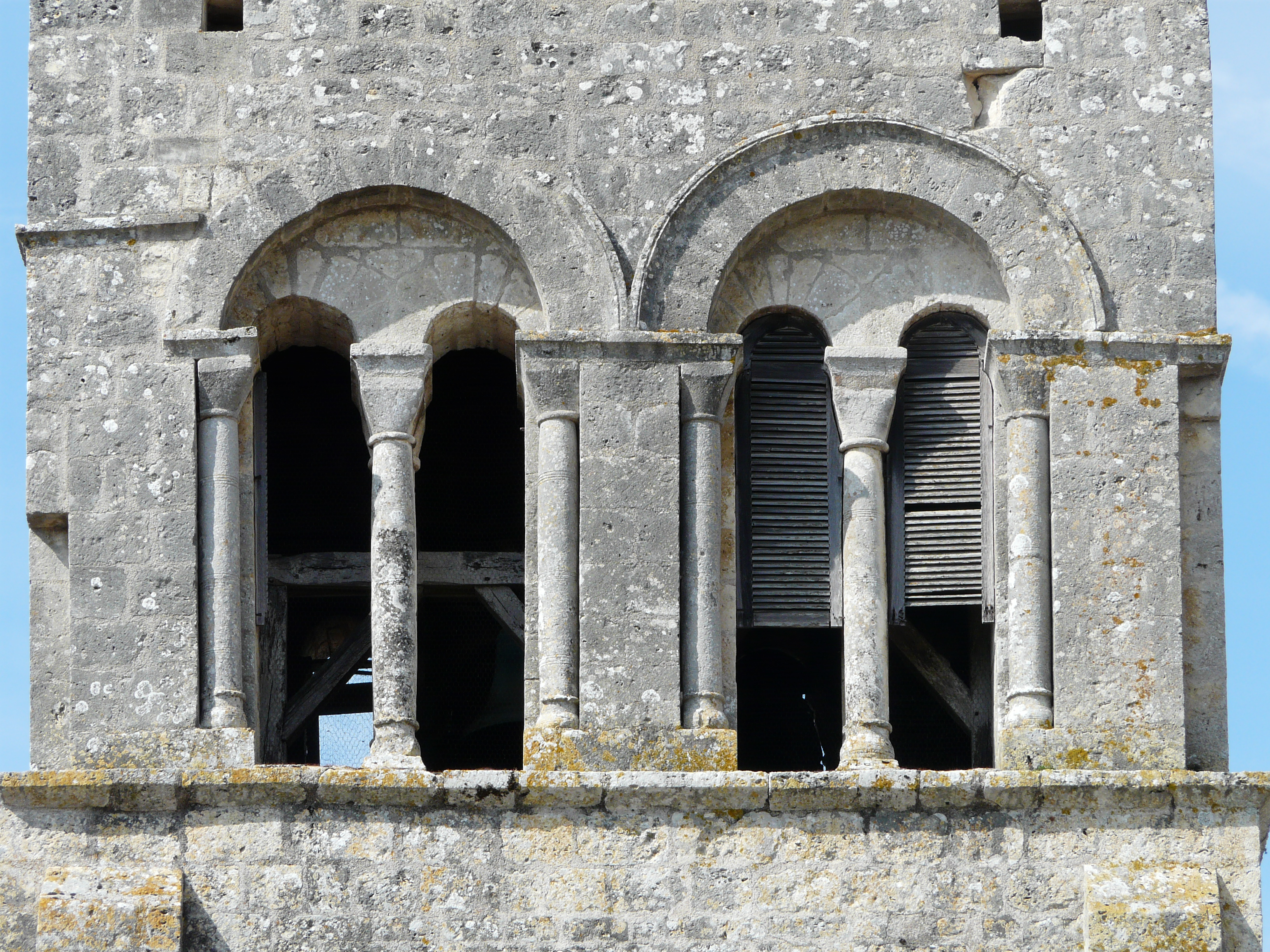 Côté sud, les ouvertures du clocher de l'église Saint-Christophe de Vindelle, Charente, France.